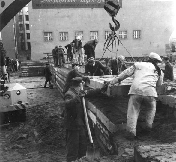 ADN-ZB-Stöhr-4.12.1961-In der Nacht vom 3. zum 4.12.1961 wurde begonnen, an weiteren Abschnitten die Staatsgrenze der DDR zu Westberlin zu festigen.